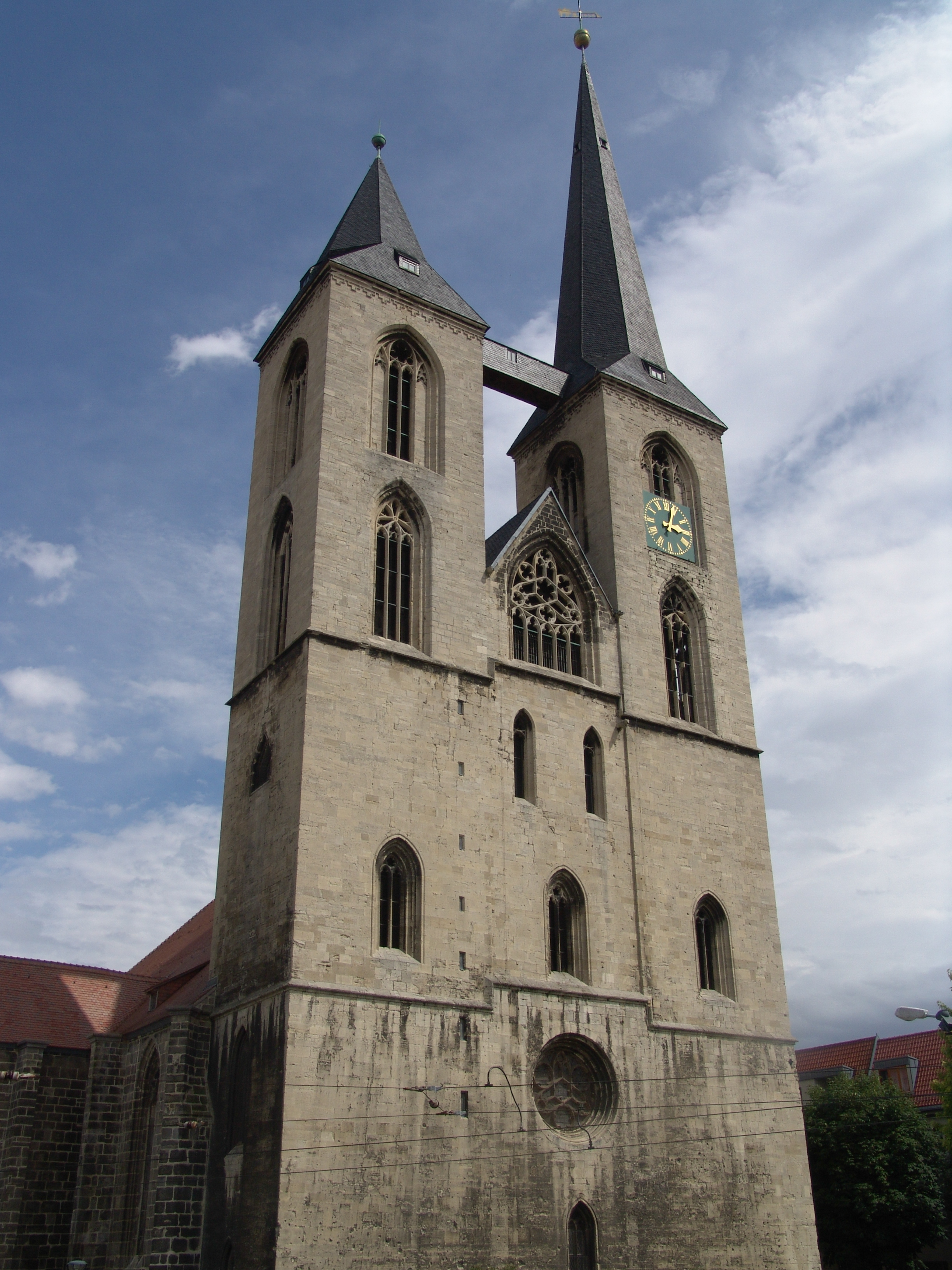 Martinikirche Halberstadt